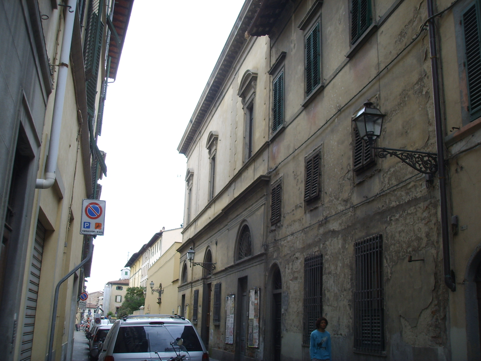 Via della chiesa, firenze